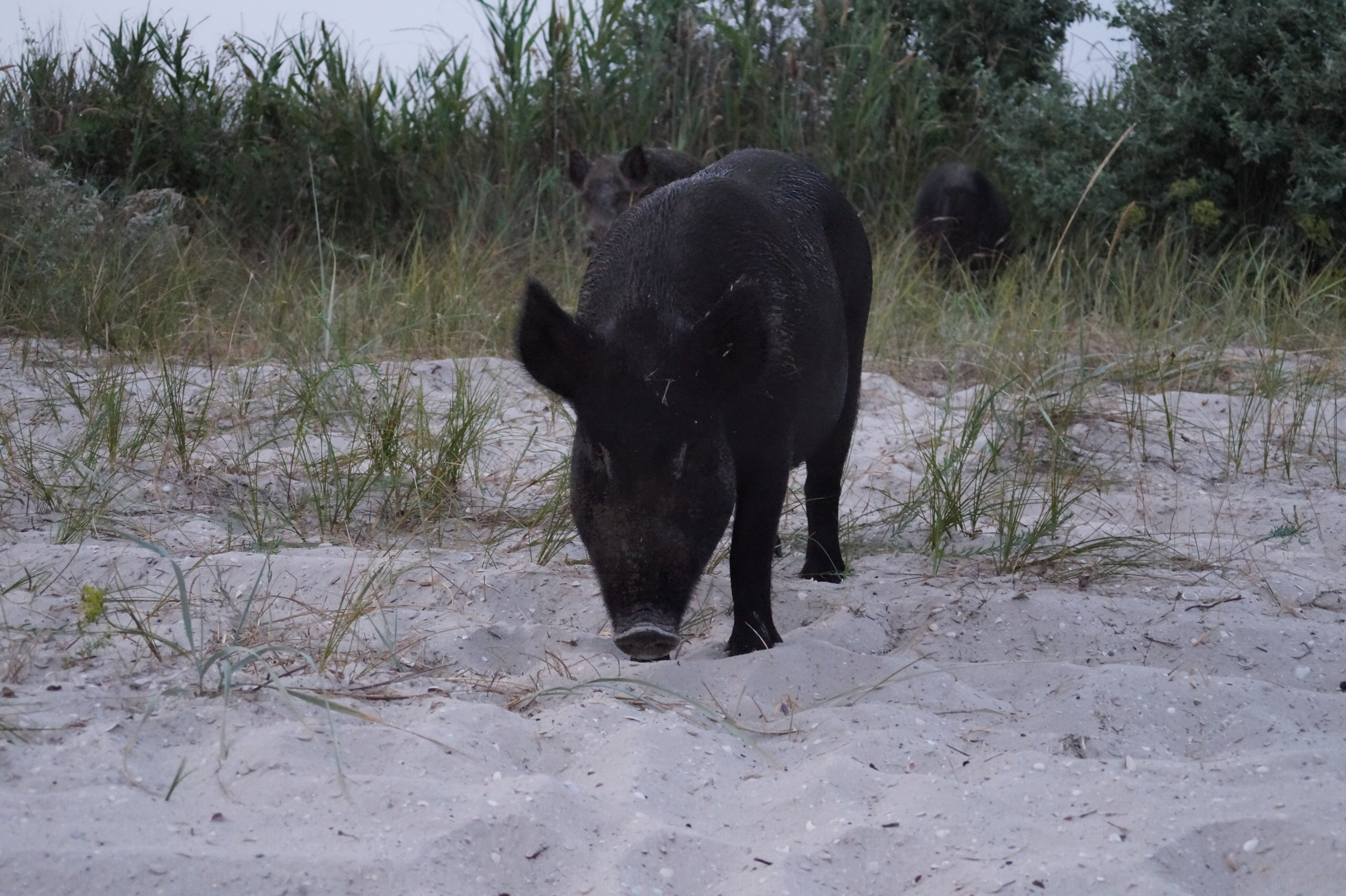 Джарилгацький, Скадовський район, Адміністрація створюється